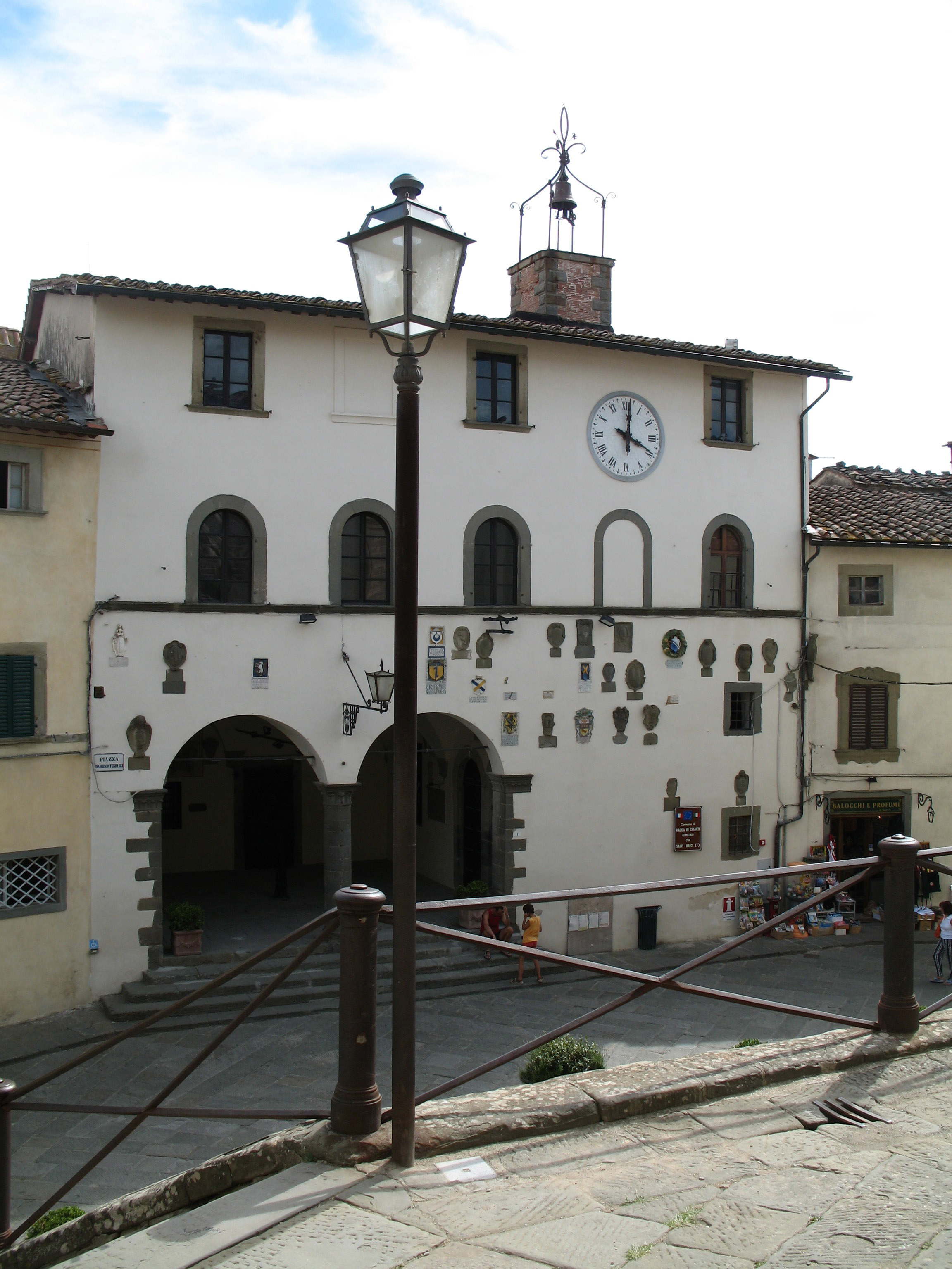 Palazzo Comunale di Radda in Chianti